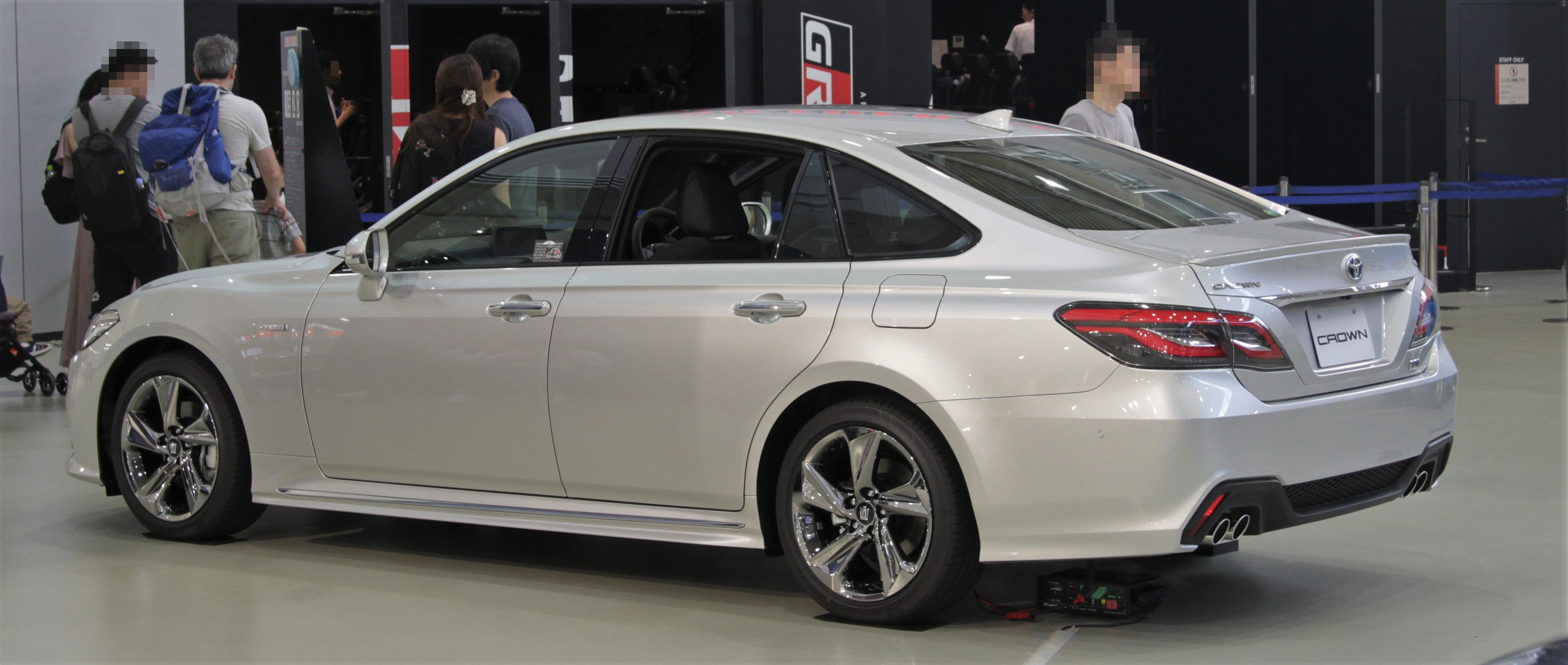 Toyota Crown (S220)